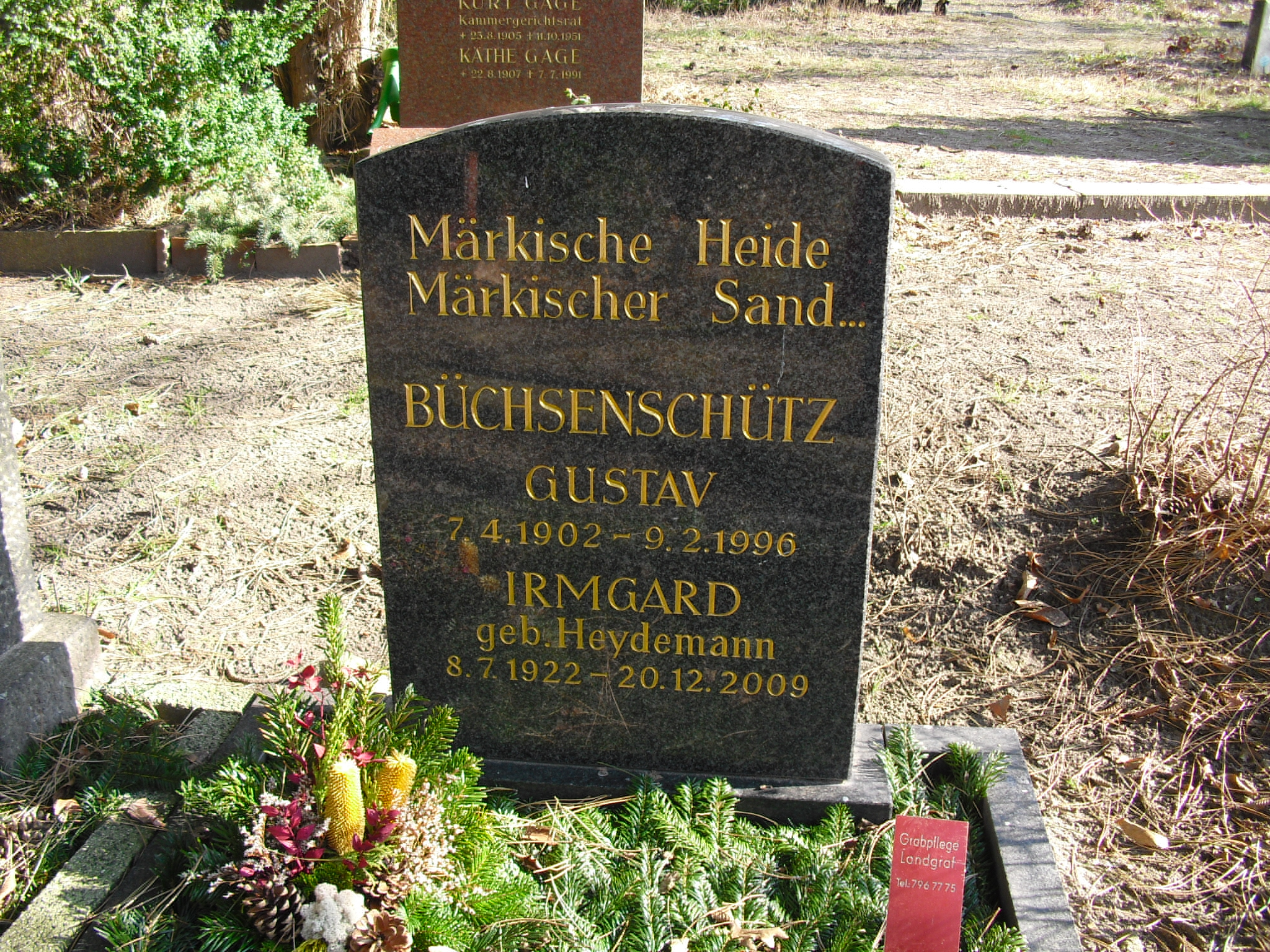 Grab des Dichters des Liedes Märkische Heide, märkischer Sand (Steige hoch, Du roter Adler) Gustav Büchsenschütz auf dem Friedhof Steglitz